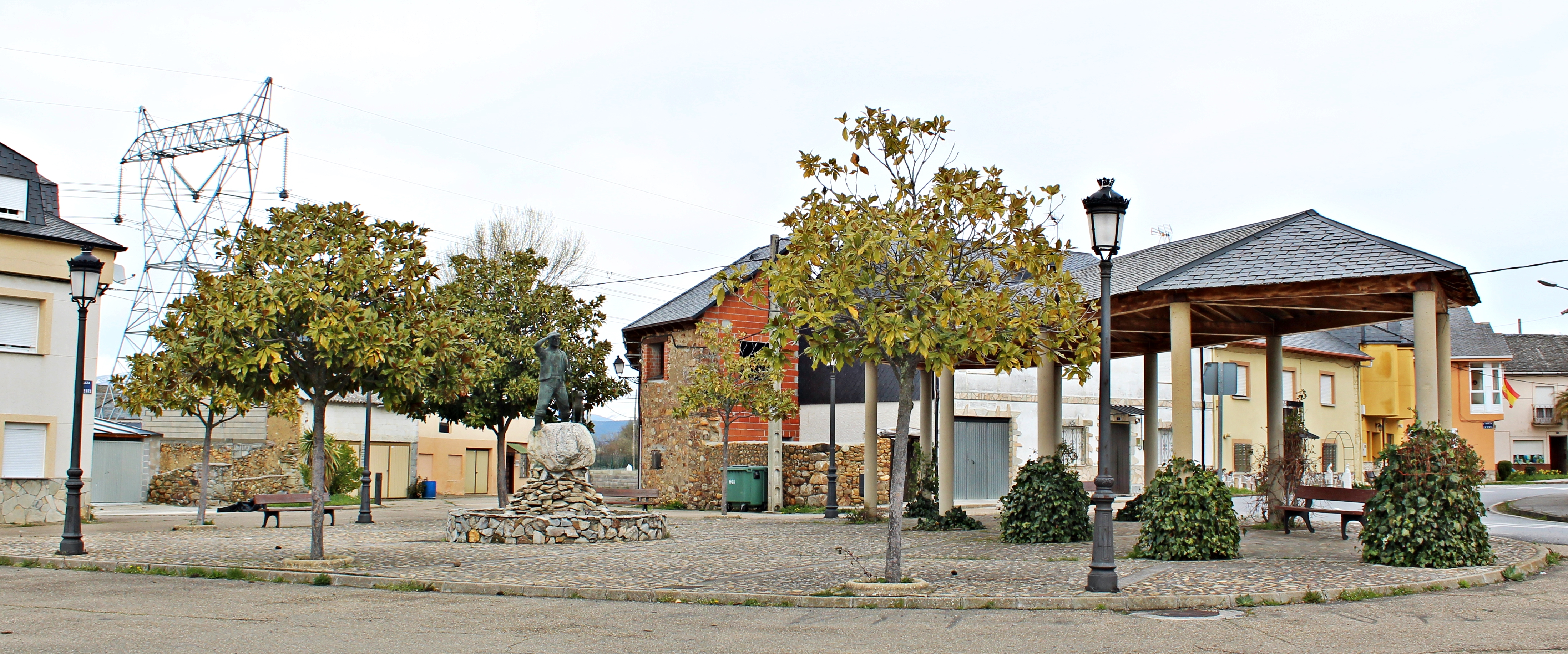 Plaza de la Calle Doce y monumento al Pastor en Castropodame, provincia de León, comarca de El Bierzo.